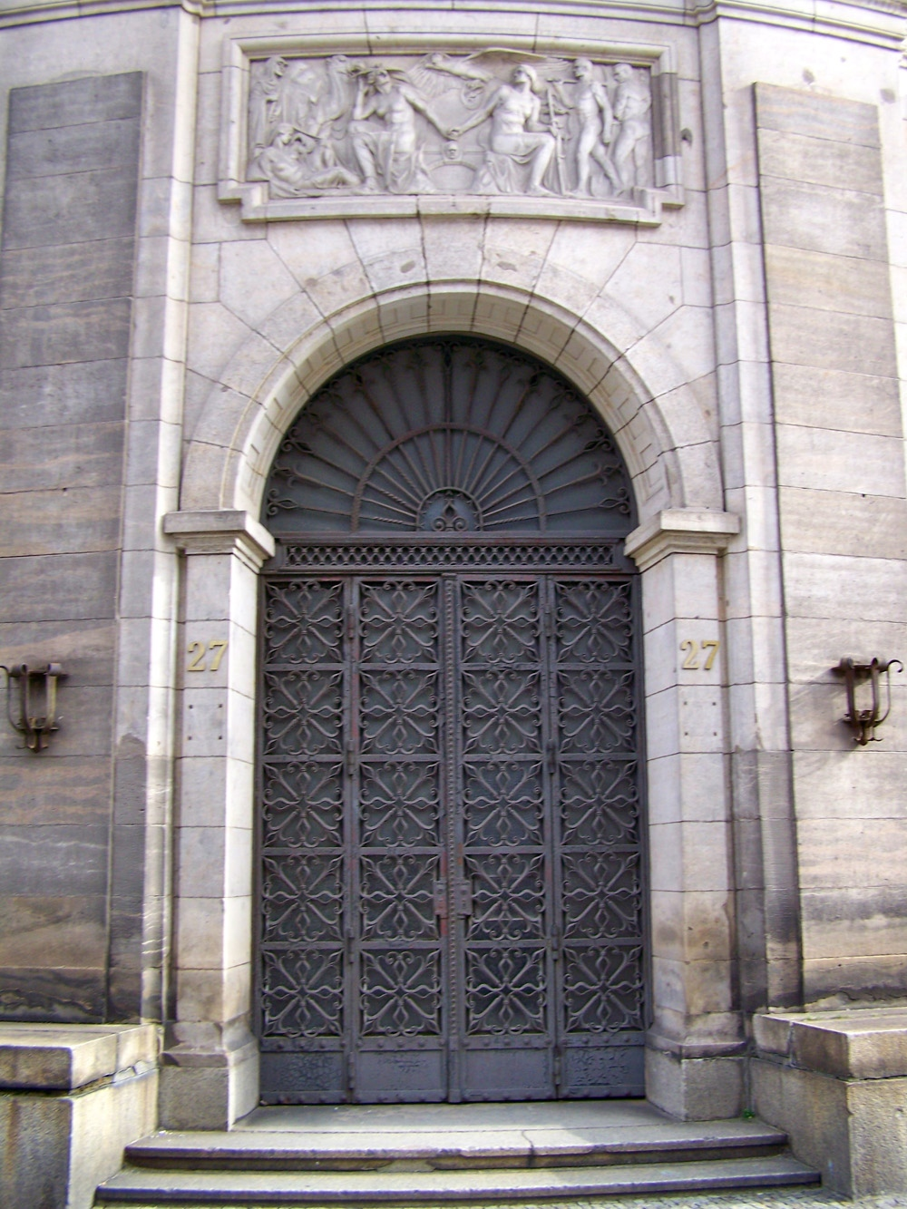 Der Gebäudekomplex der Deutschen Bank in Berlin-Mitte. Block II - Haupteingang